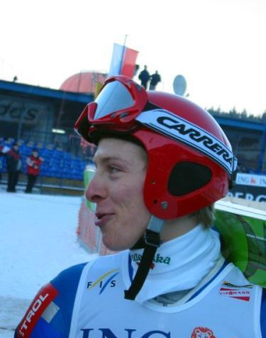 Jure Radelj